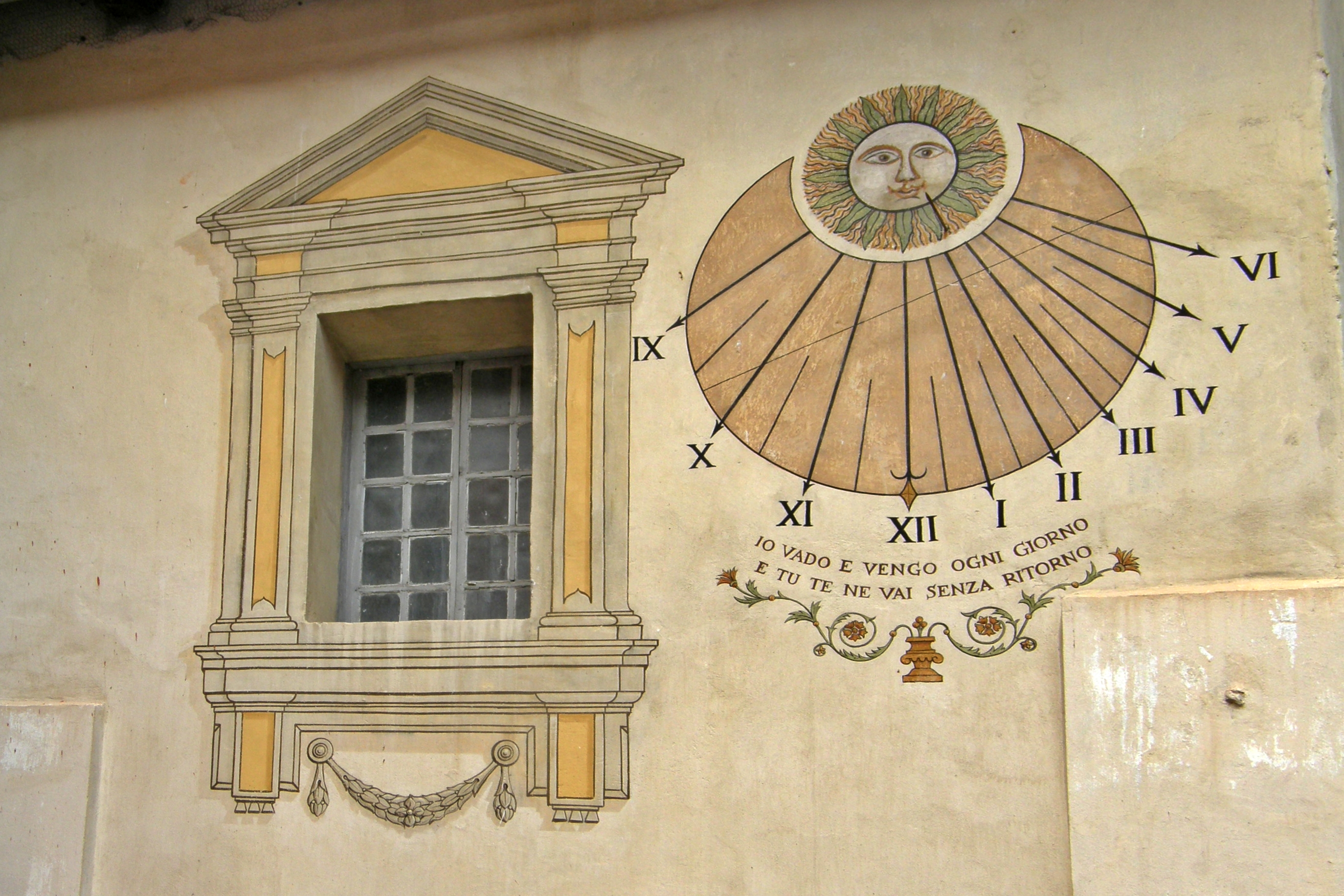 Fenêtre avec cadre en trompe l'œil, Saint-Étienne-de-Tinée, Alpes-Maritimes, France. Caption: "IO VADO E VENGO OGNI GIORNO / E TU TE NE VAI SENZA RITORNO"